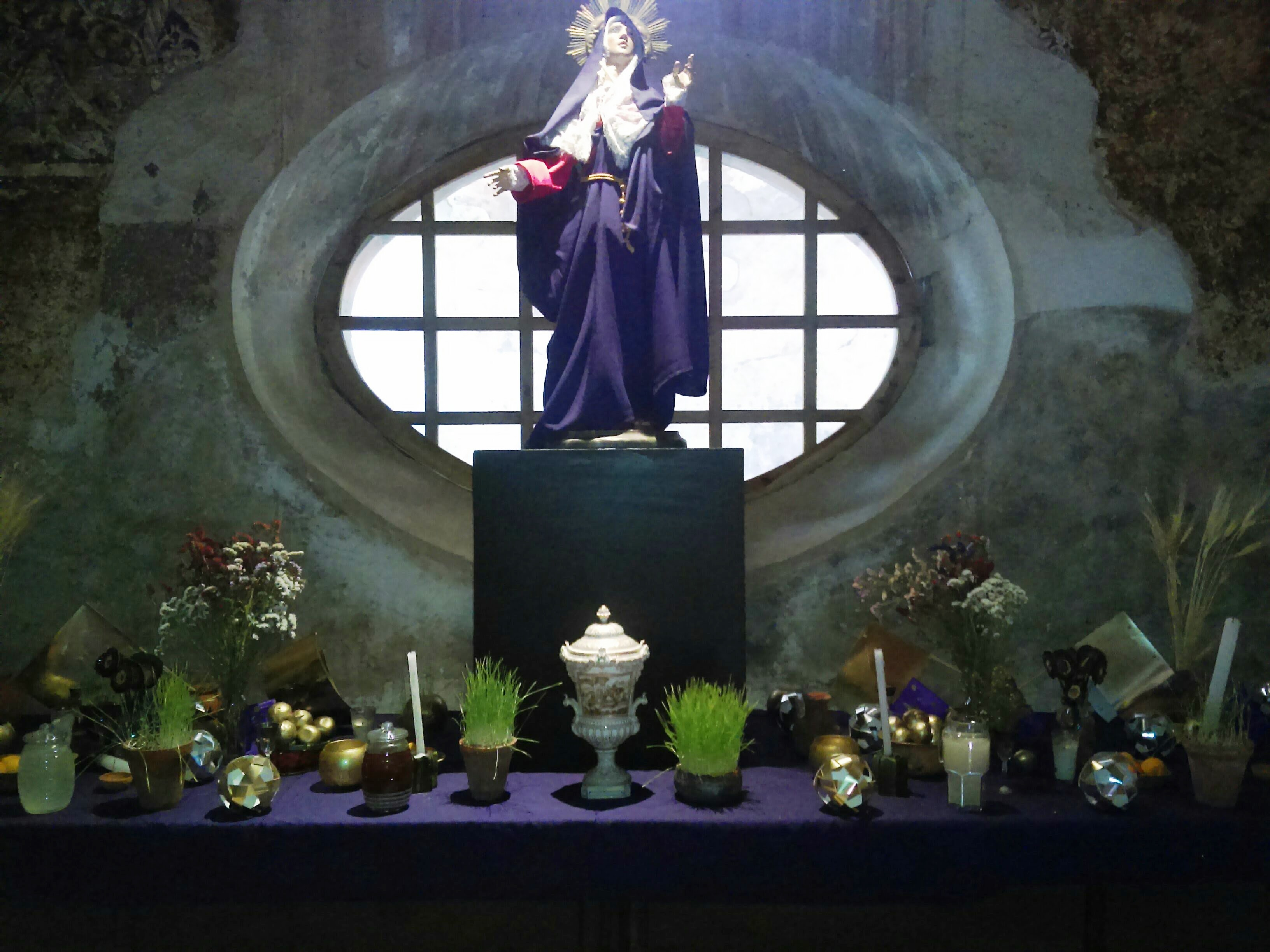 Altar de Dolores en Actopan, Hidalgo, México (2017)